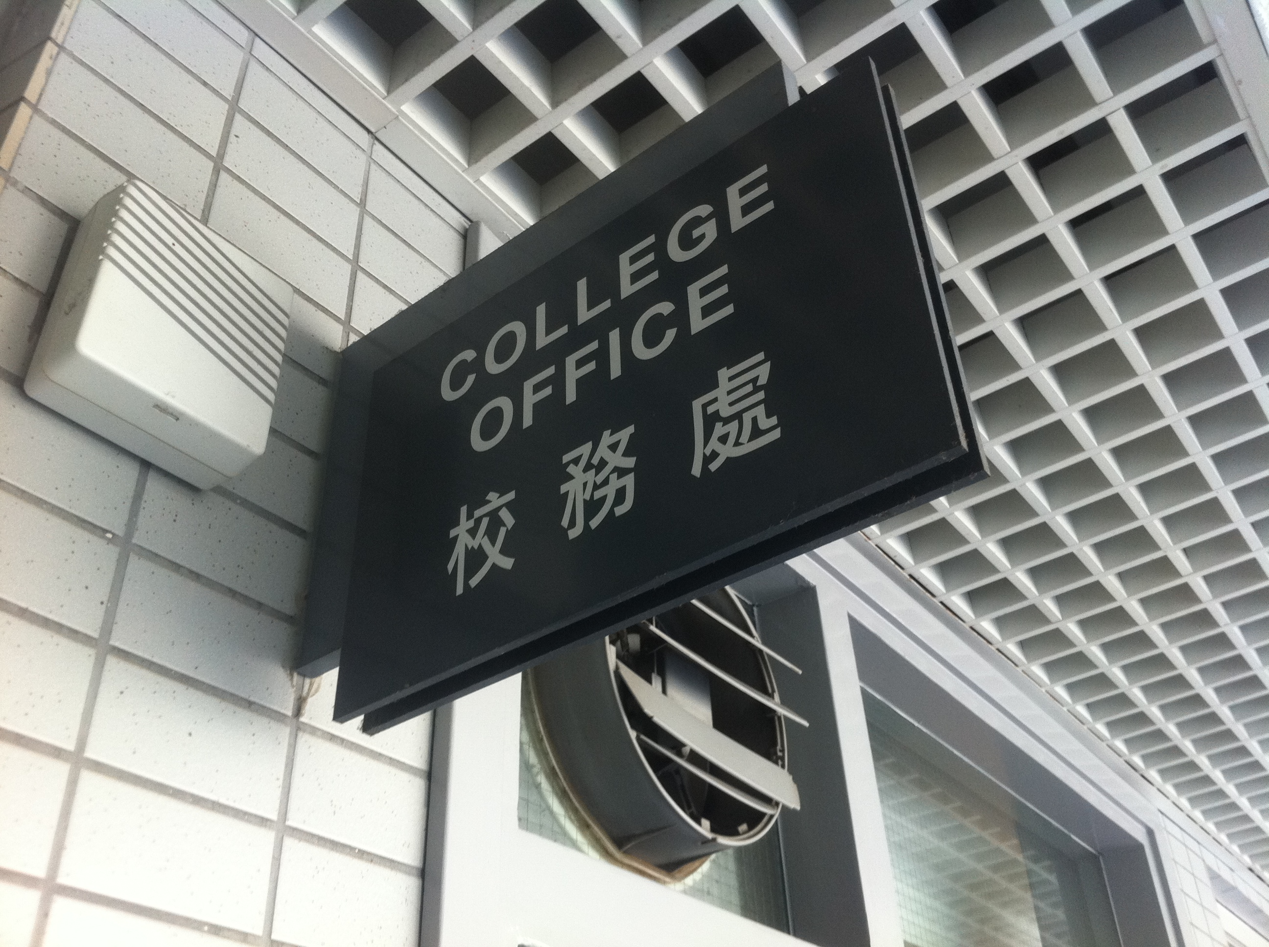 中文（香港）: 香港聖保羅書院 2011年11月 開放日教務處